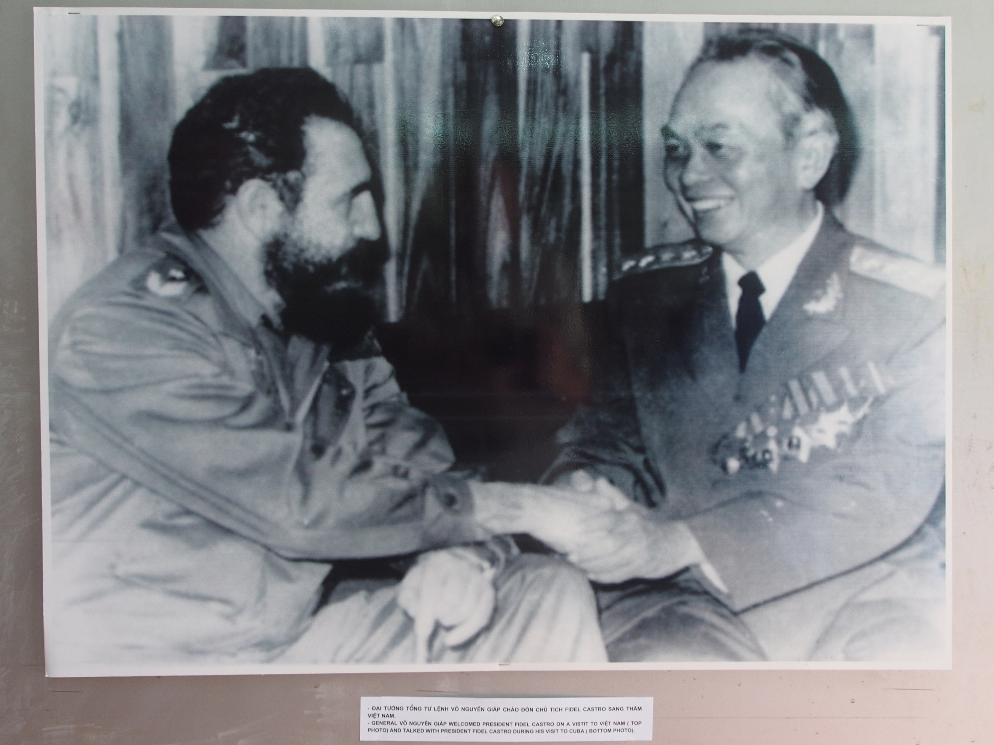 General Giap and President Fidel Castro